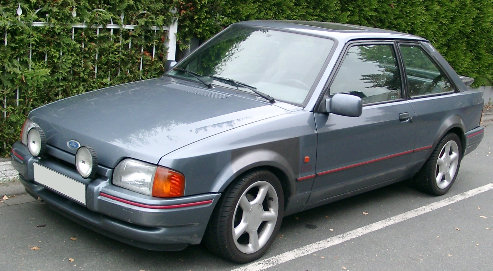 Ford Escort Mk4 (XR3i)